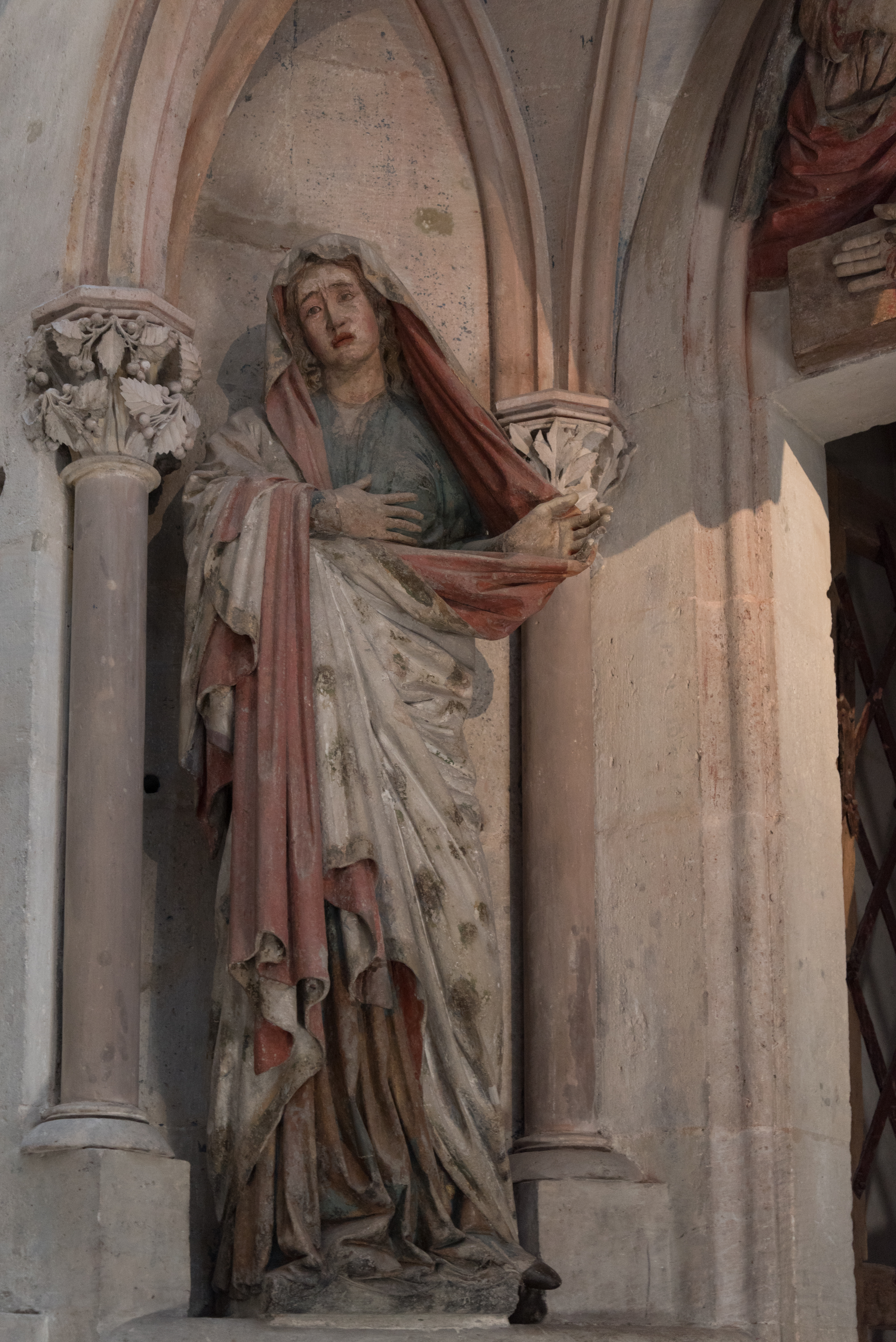 Naumburg an der Saale, Dom, Westlettner